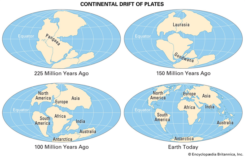 Süperkıta oluşumu hakkında bir resim